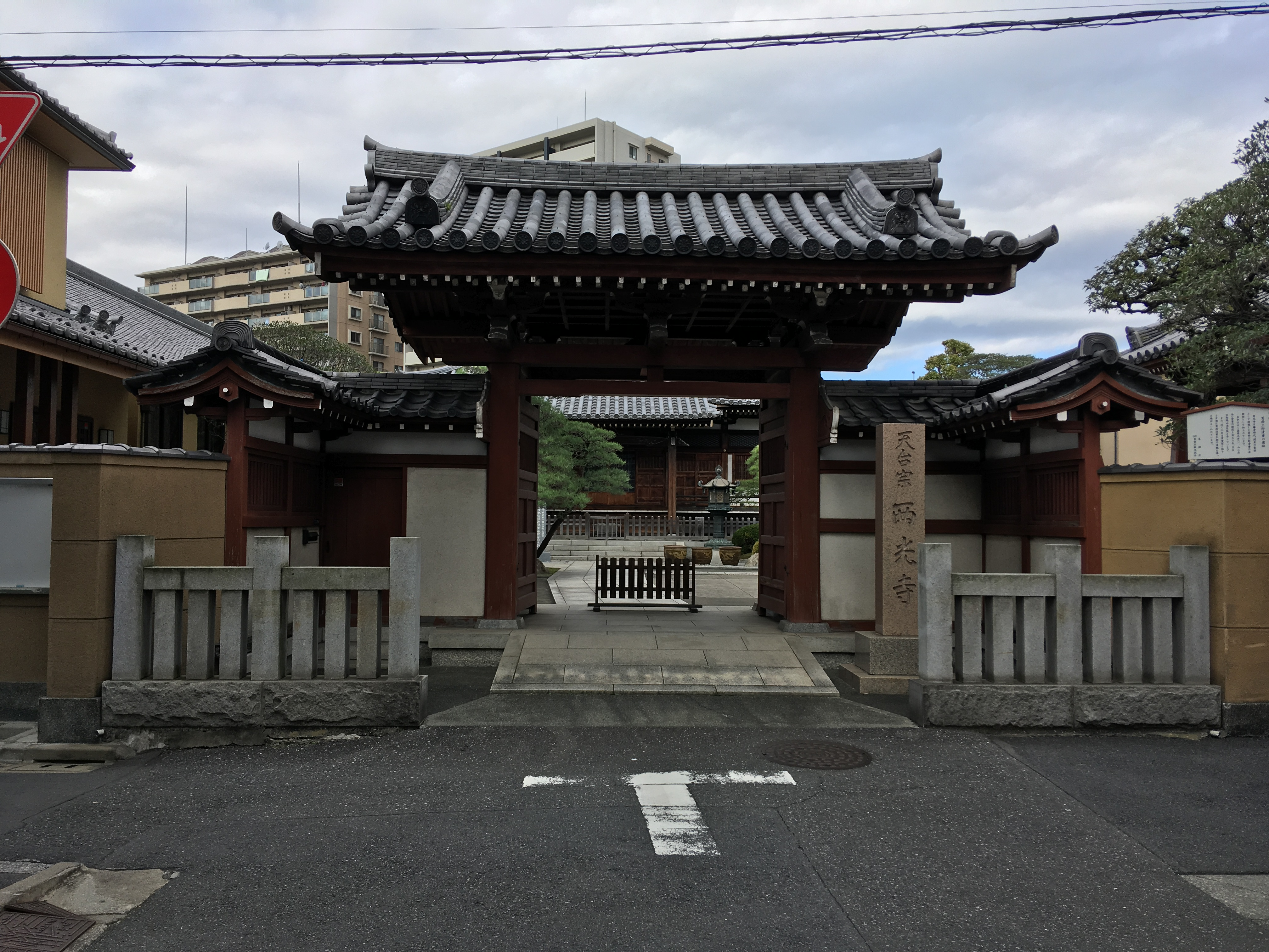 葛飾区四つ木にある西光寺の山門